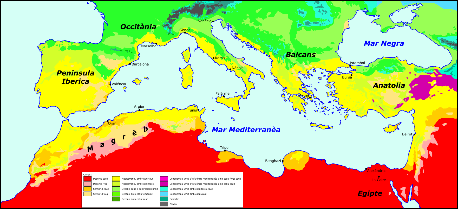 Esquèma dei zònas climaticas a l'entorn de la Mar Mediterranèa.